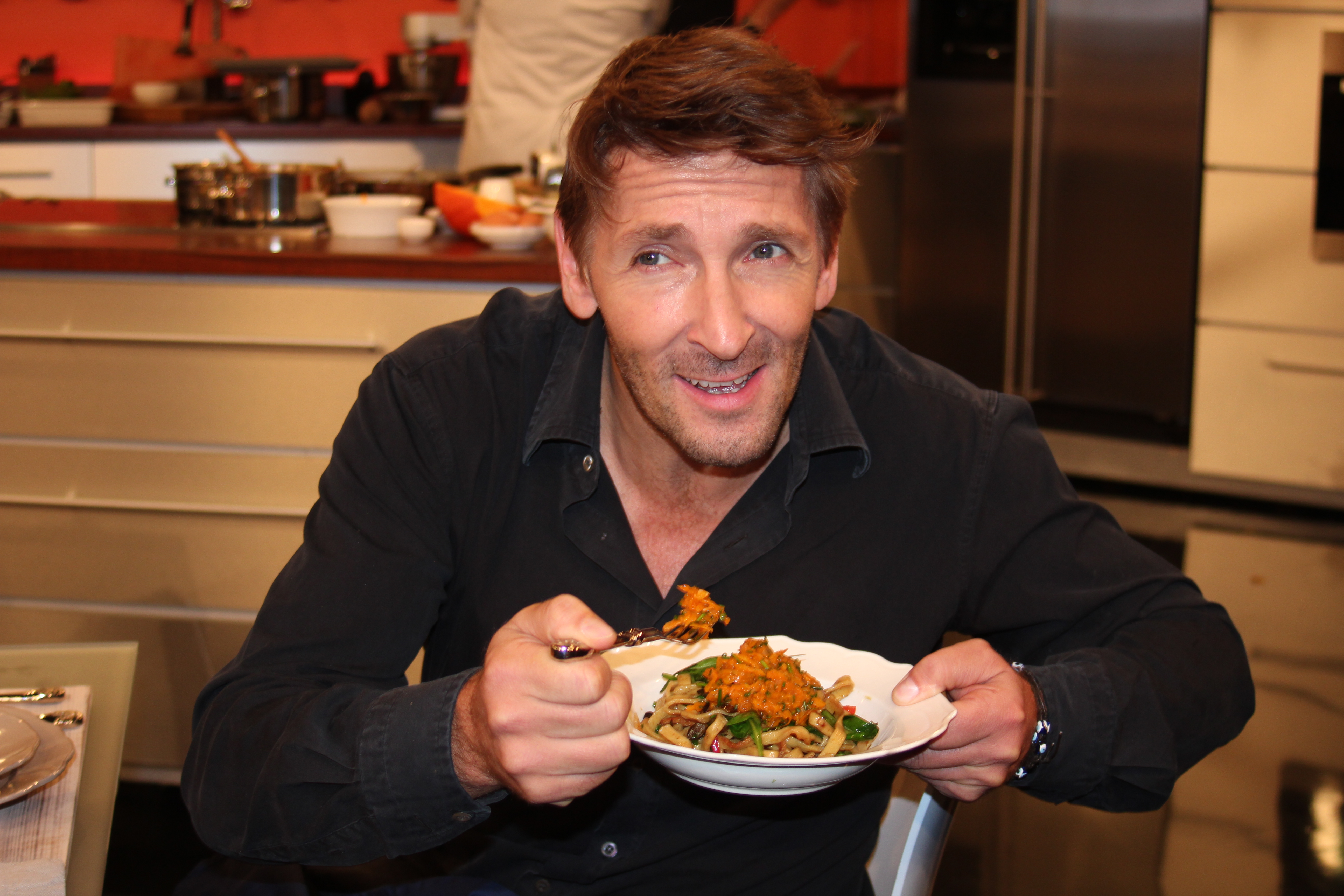 Fernsehaufzeichnung Lafer Lichter Lecker